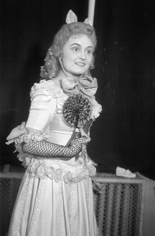 Original image description from the Deutsche Fotothek Gruppenbild mit Regisseur Ernst Legal